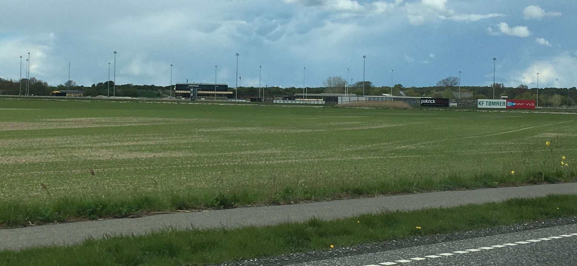 Nykøbing F. Travbane